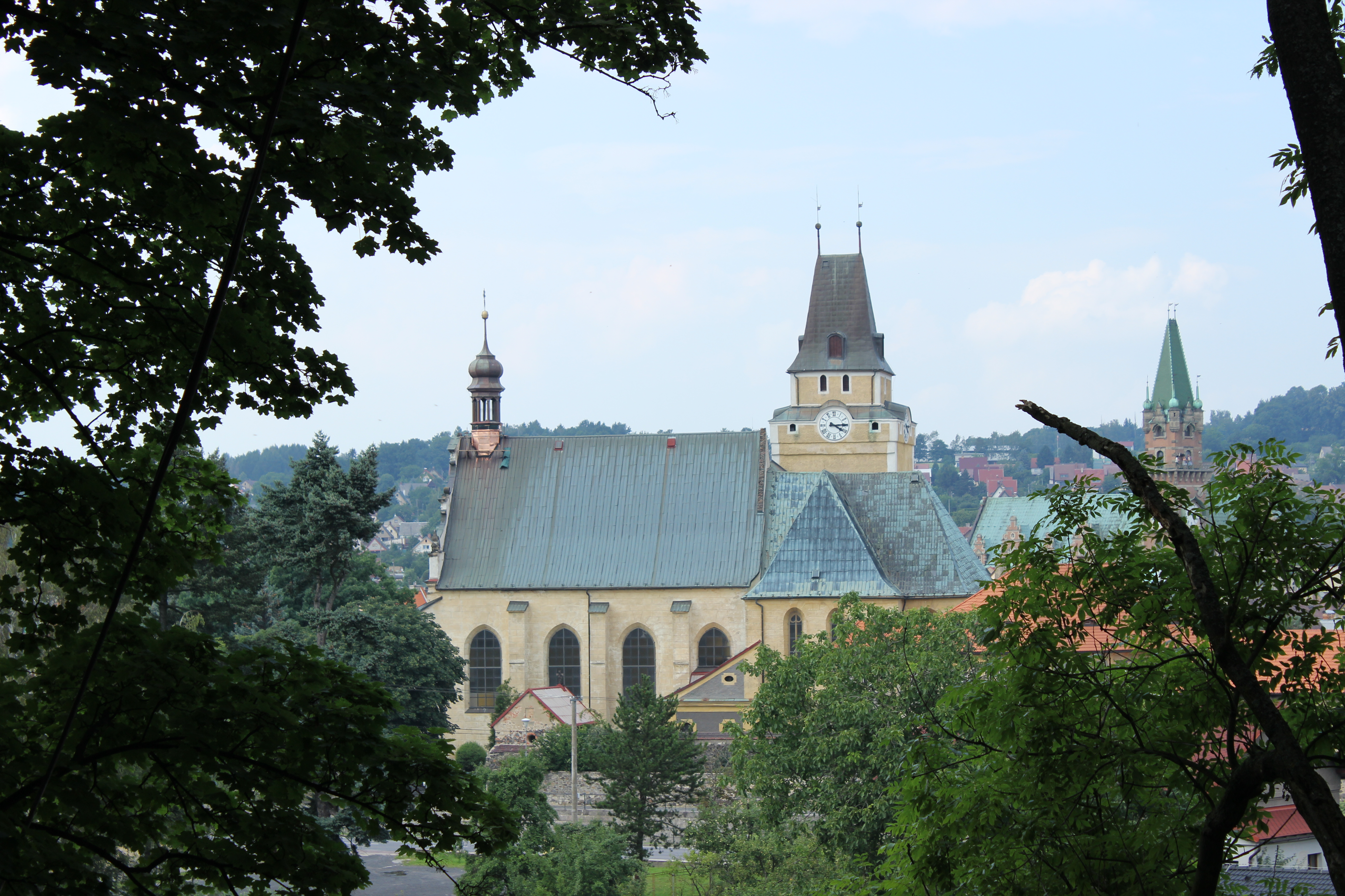 Frýdlantský kostel Nalezení svatého Kříže z Vrchlického ulice.